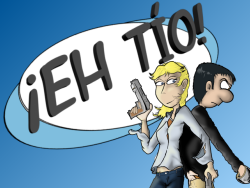 ¡Eh tío! Leo y Antuán